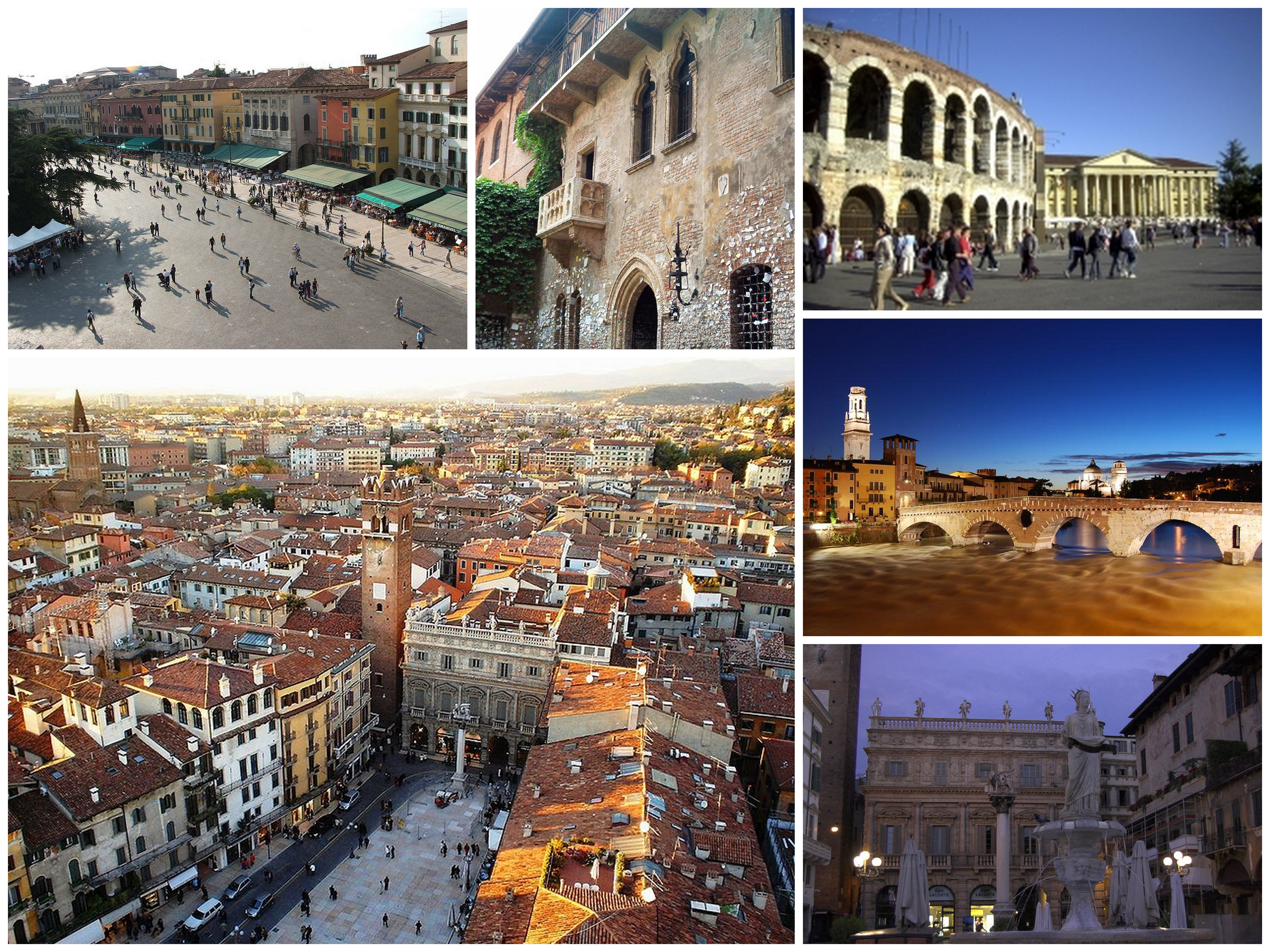 Collage di varie foto di Verona